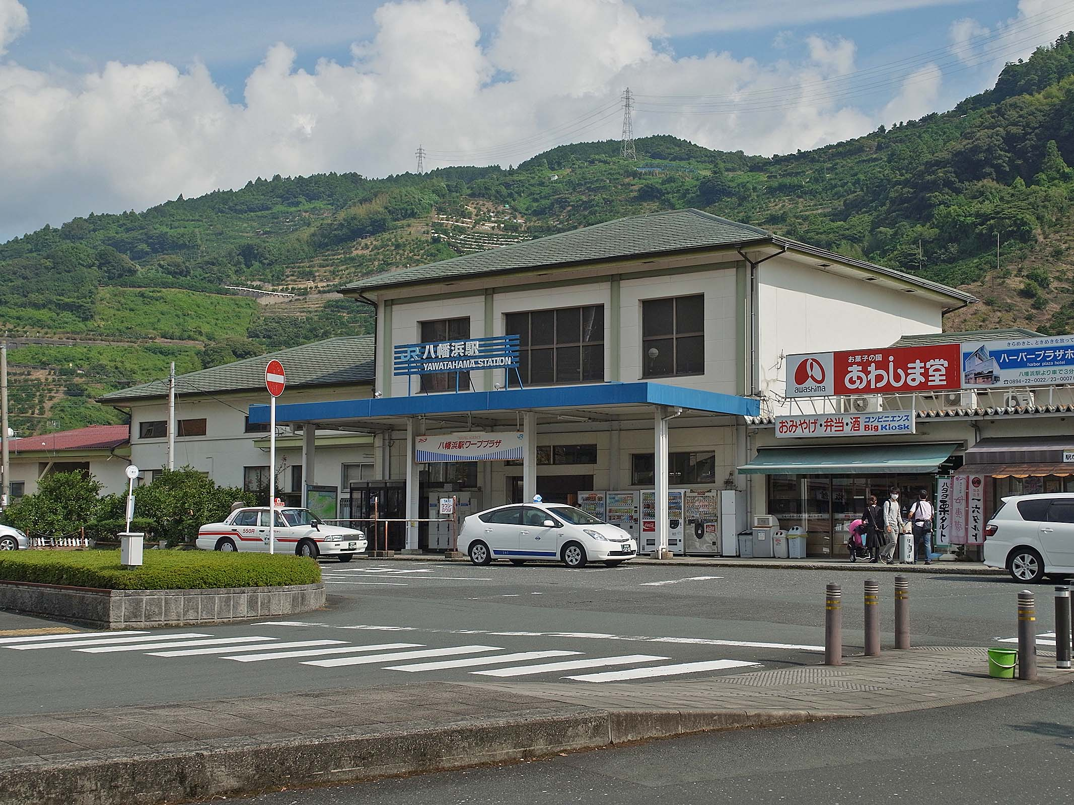 JR Yawatahama station , JR 八幡浜駅